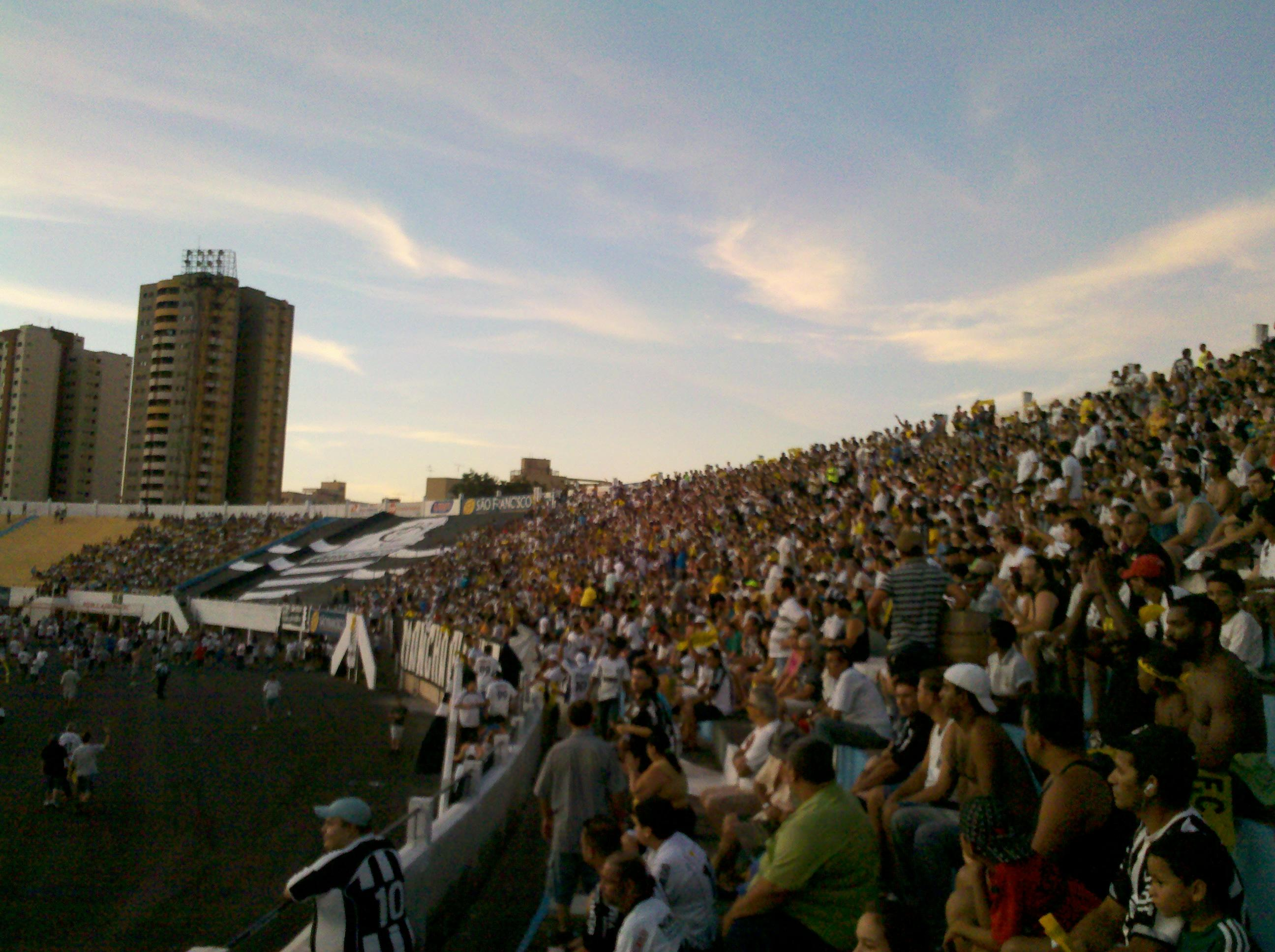 Torcidad o BAFO lotando a Jóia de Cimento